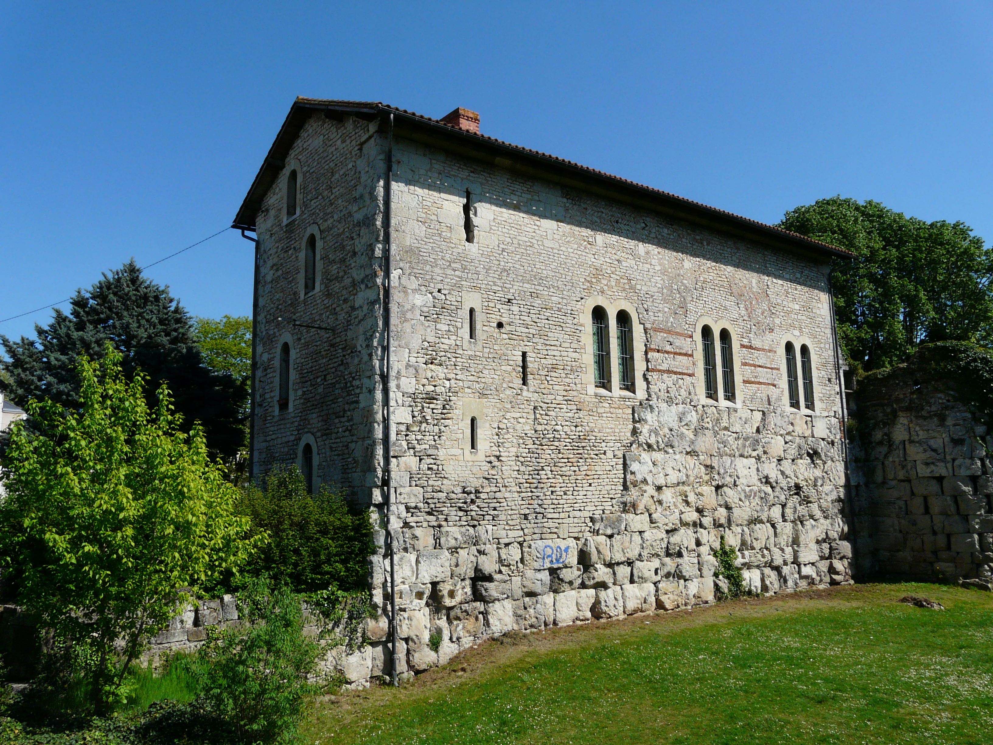 Le côté ouest de l'hôtel d'Angoulême, Périgueux, Dordogne, France. Les gros moellons à la base du mur sont des vestiges de la citadelle gallo-romaine de Périgueux.